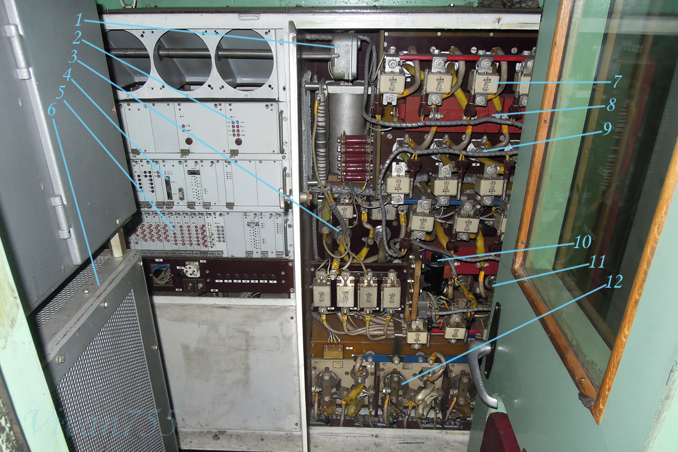 Вспомогательный преобразователь UNIPULS 81A электровоза ЧС8, вид из кабины. 1 — термостат подогрева электроники, 2 — кассеты питания электроники, 3 — выпрямитель питания вспомогательных машин, 4 — кассеты управления реостатным тормозом, 5 — кассеты управления вспомогательными машинами, 6 — стабилизатор ASL3, 7 — предохранитель диода, 8 — компенсирующий трансформатор, 9 — диод выпрямителя возбуждения, 10 — блокировка шкафа, 11 — тиристор выпрямителя возбуждения, 12 — тиристор преобразователя питания вспомогательной машины.